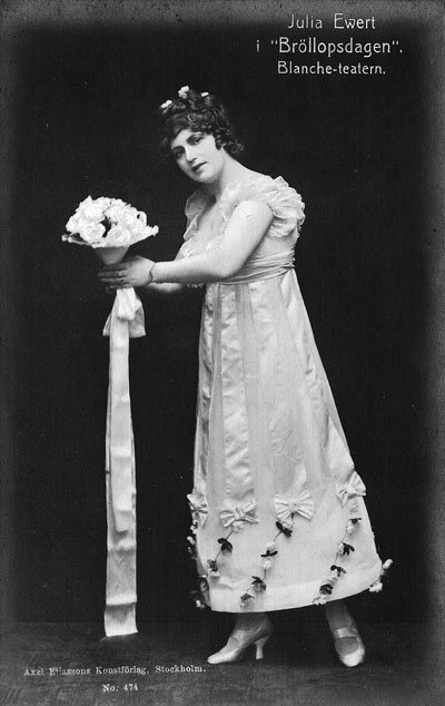 Julia Ewert i Bröllopsdagen